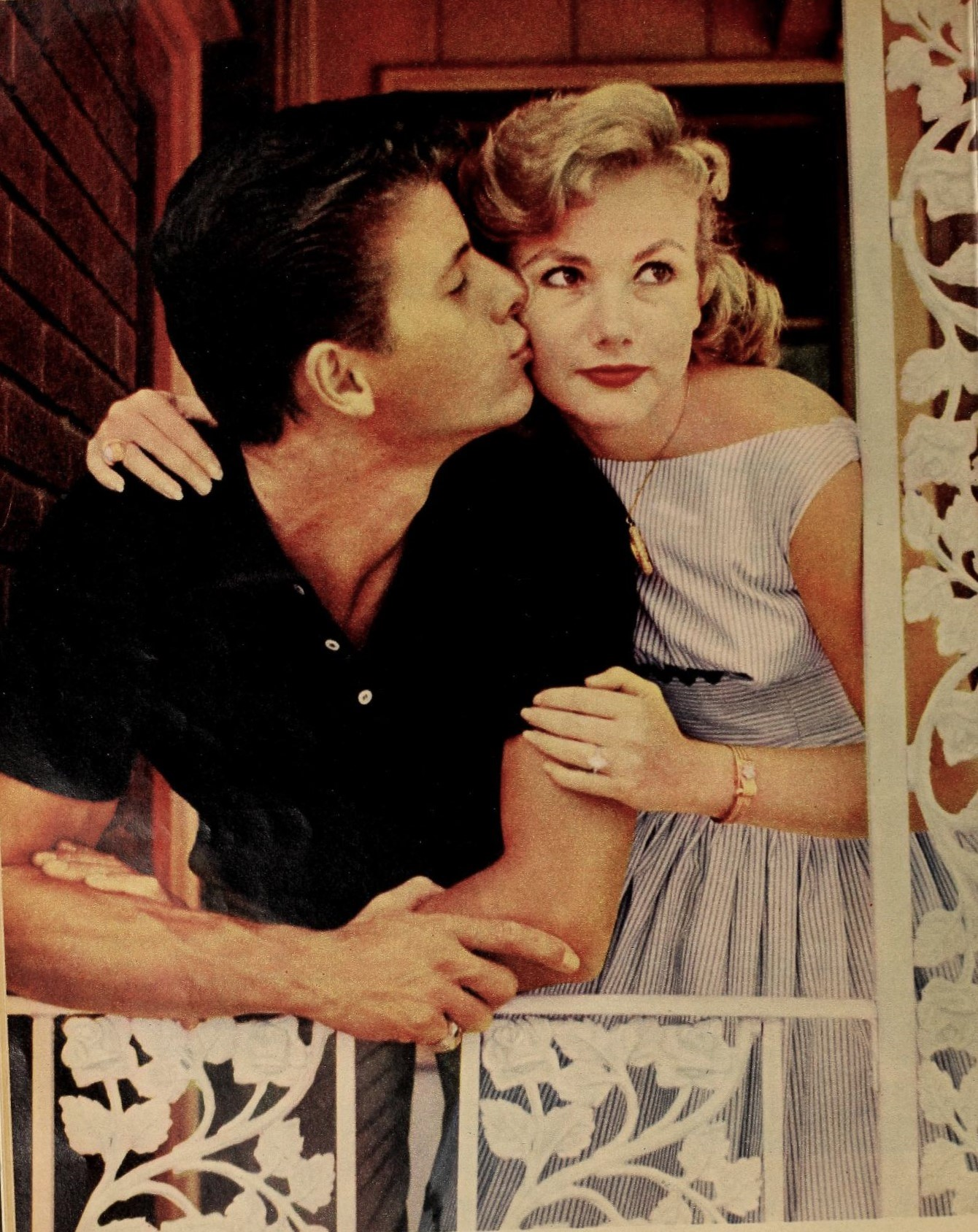 Peter Brown and Diane Jergens, 1959